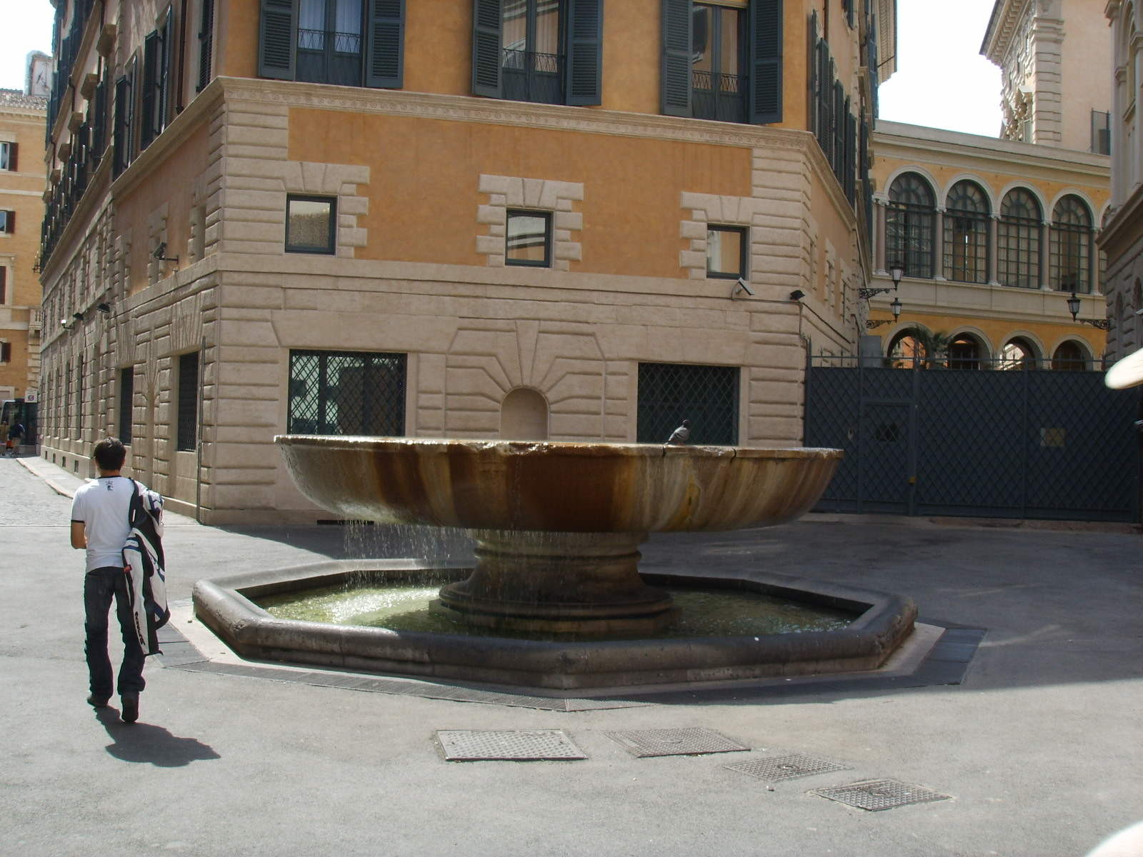 Palazzo Madama fountain, in Rome, Italy